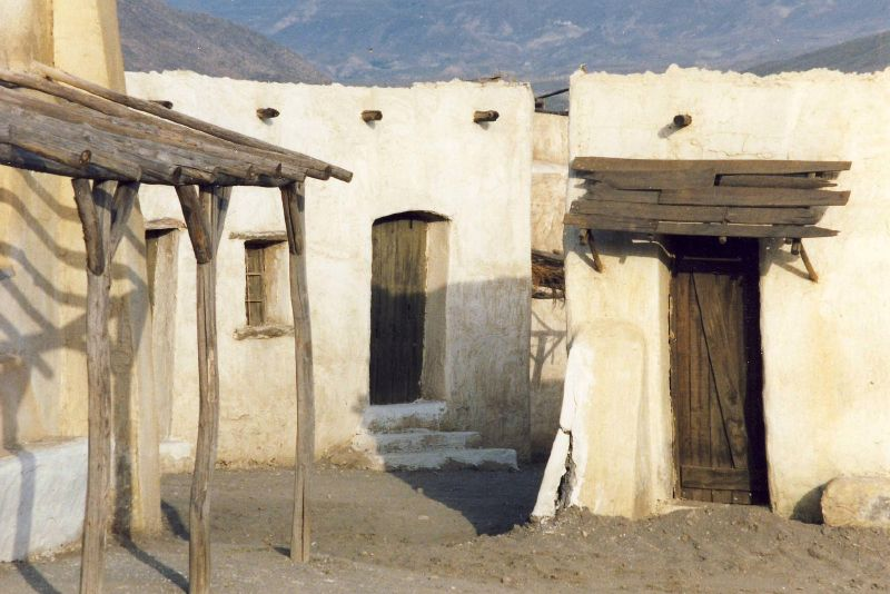 Décors du film Le Bon, la Brute et le Truand